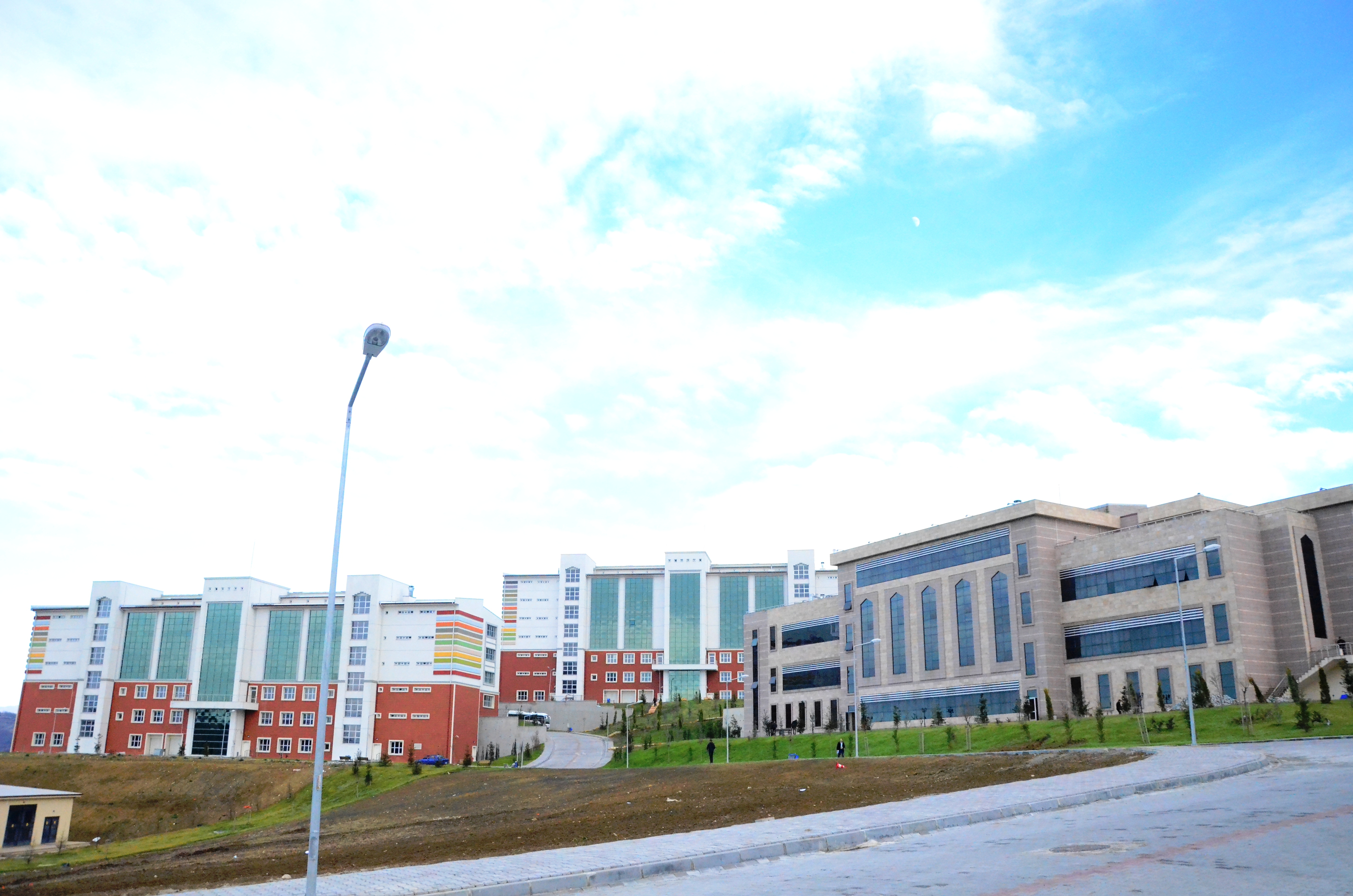 Bartın Üniversitesi Kutlubey Kampüsünden bir kare.